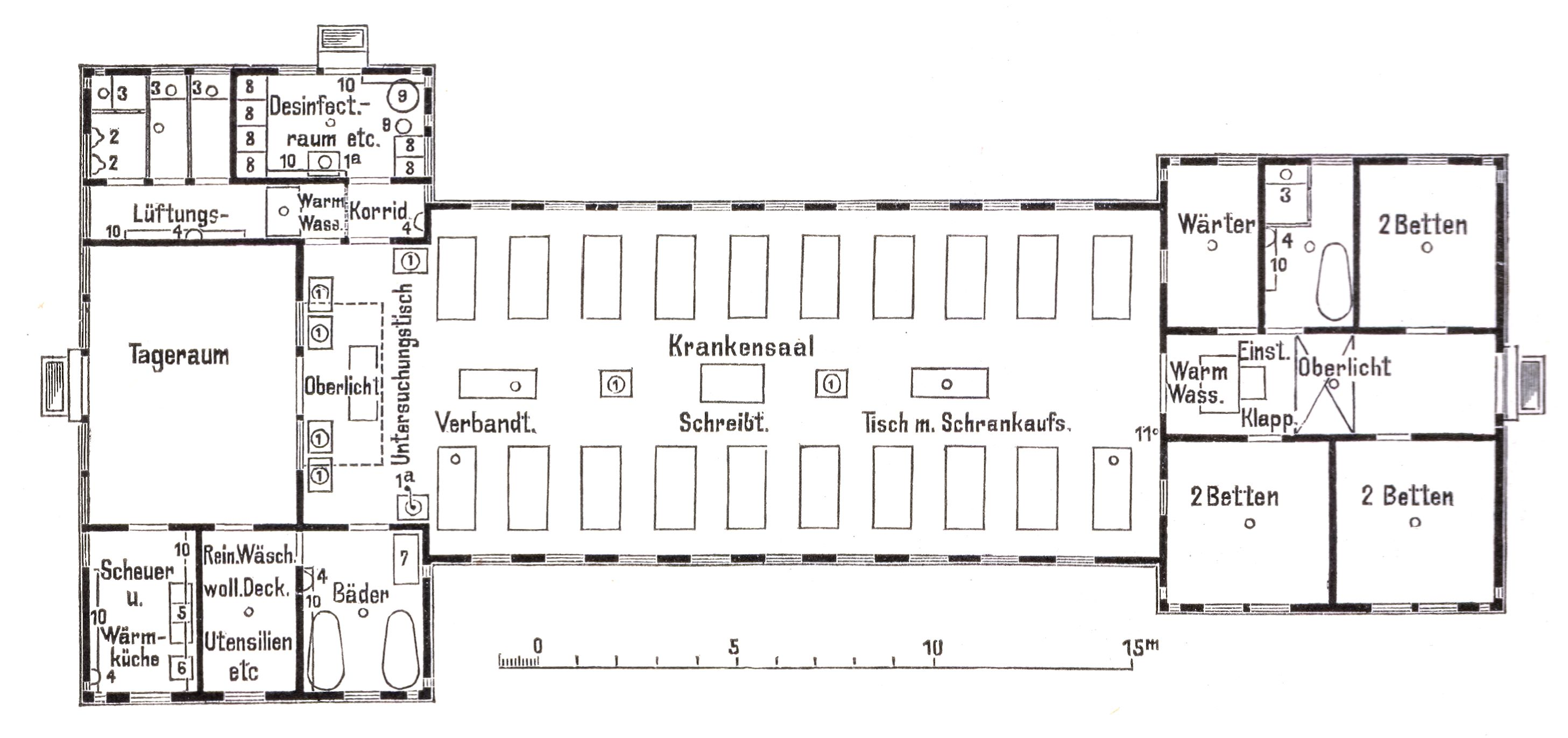 Berlin - Krankenhaus Moabit, Grundriss einer Baracke